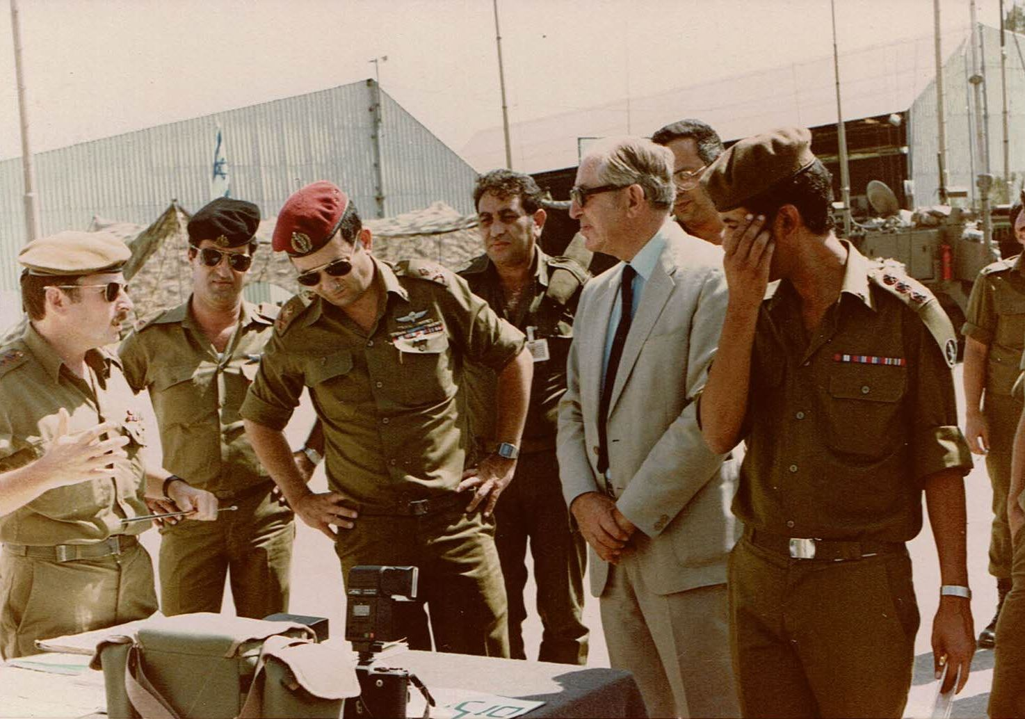 ביקור נשיא חצב